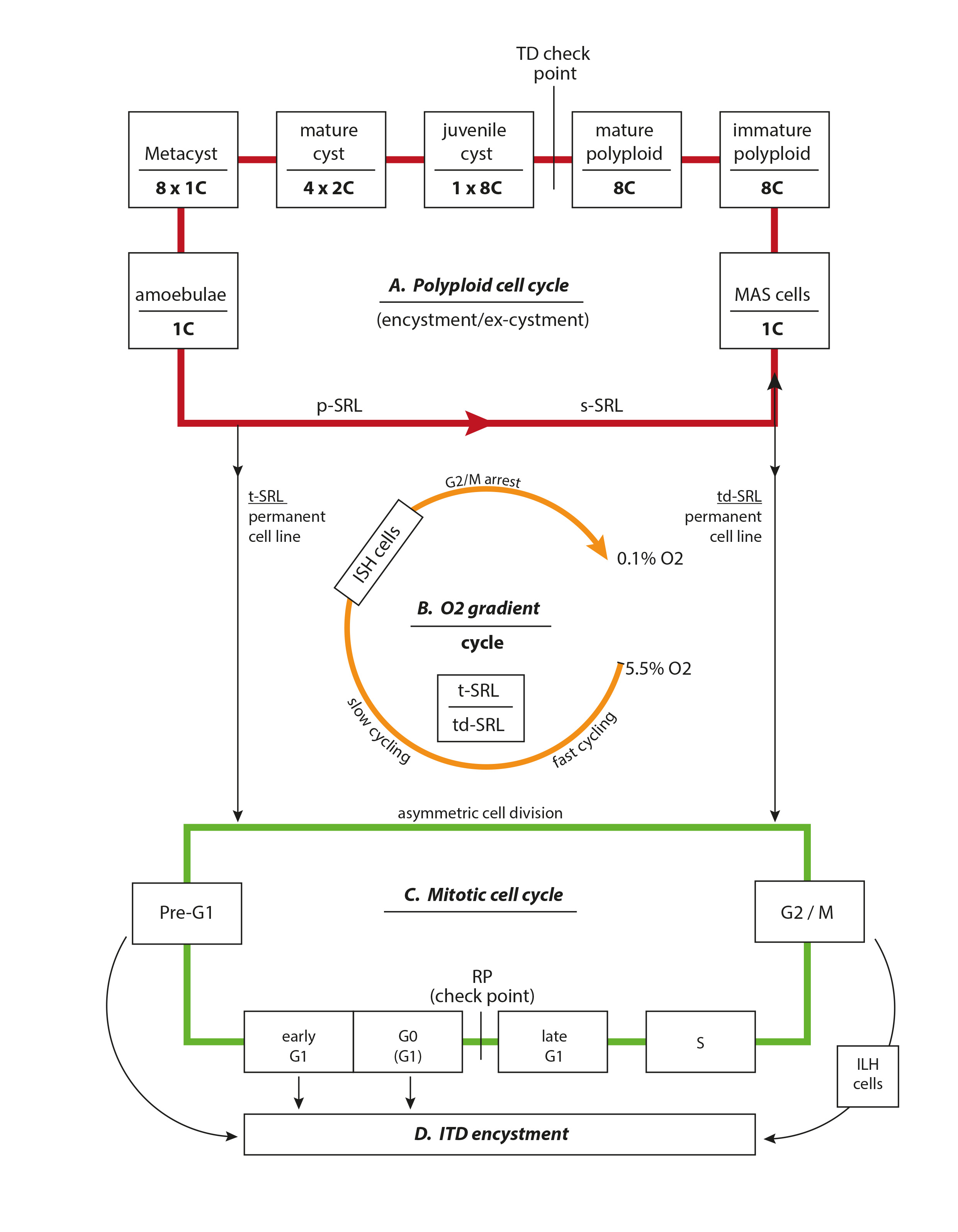 Ciclu de viata (life cycle, engl), ciclu celular, procese de inchistare-dechistare, poliploidizare si depoliploidizare, linii si sublinii celulare, influenta mediului